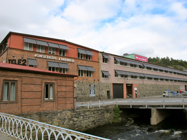 Jonsereds fabriker september 2013